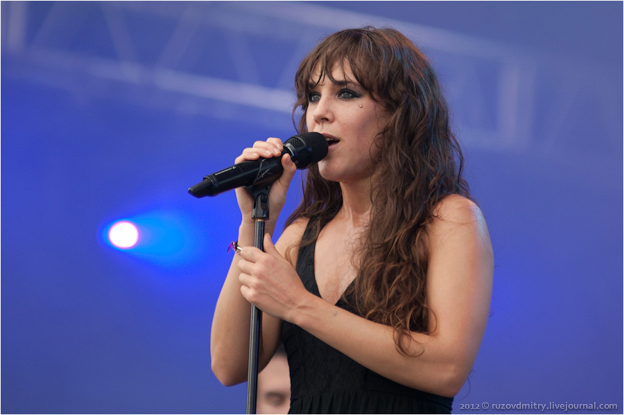 ZAZ, фестиваль "Рок над Волгой" 2012